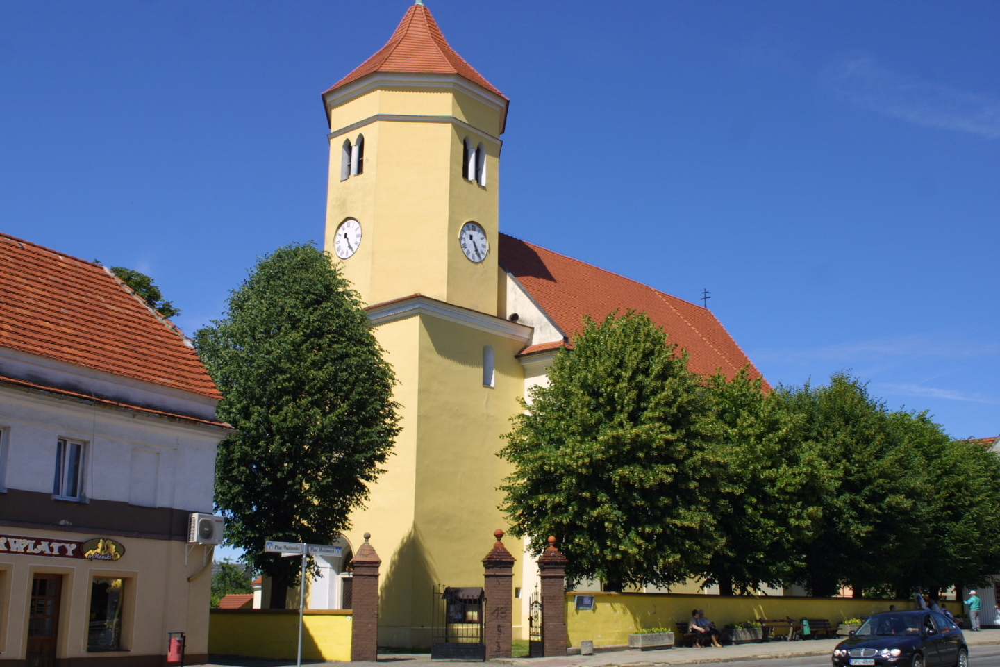 Przemków. Kościół pw. Wniebowzięcia NMP z przełomu XIV/XV w.